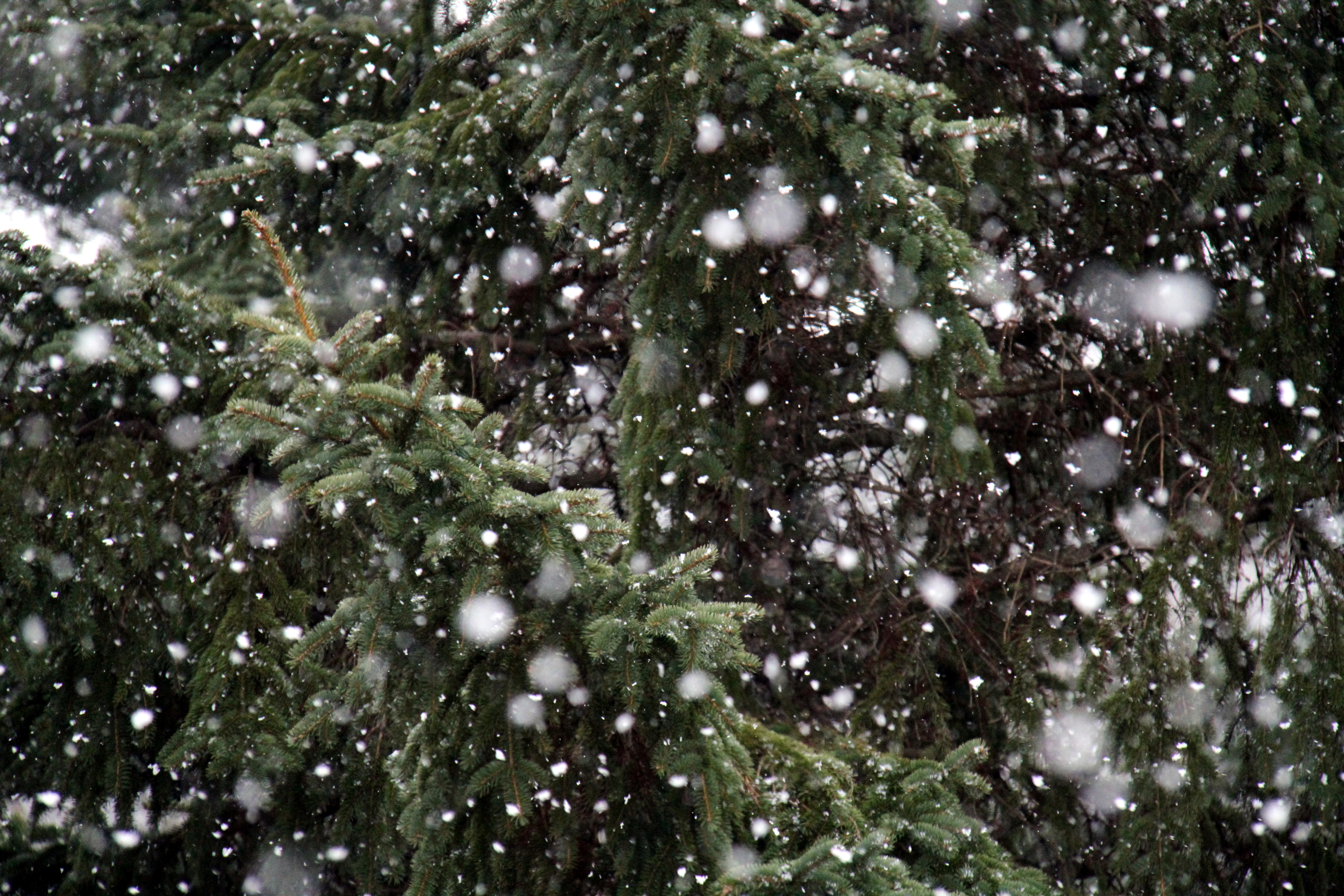 ഹിമപാതം